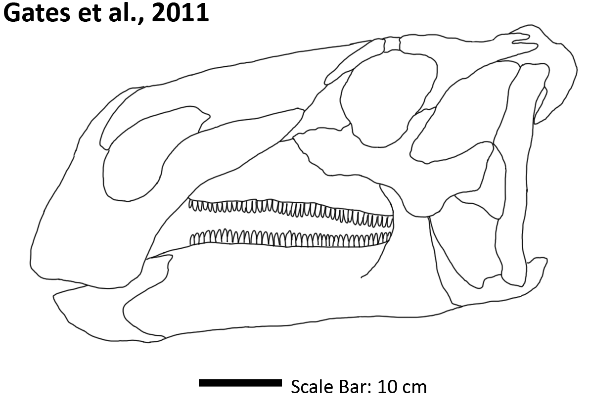 Reconstrucciòn craneal de A. gagslarsoni, con base en el estudio de Gates et al., 2011.